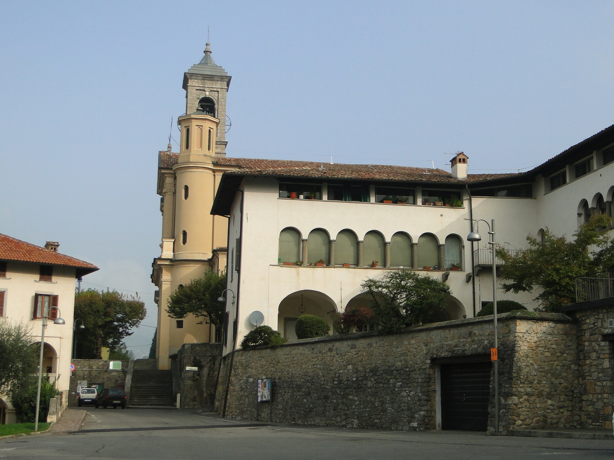 Vall'Alta di Albino (BG), ex casa dei curati